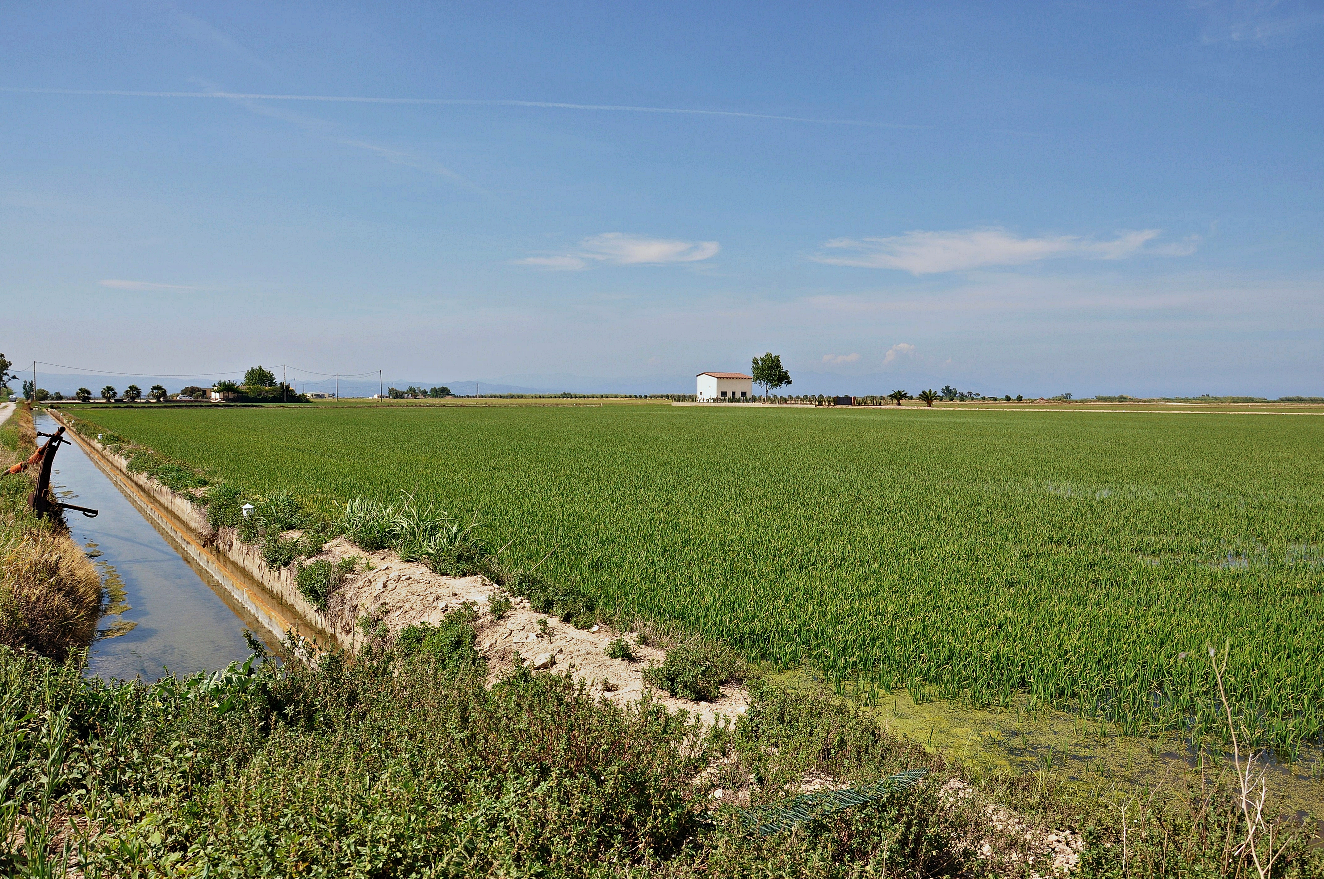 parque natural del delta-2011